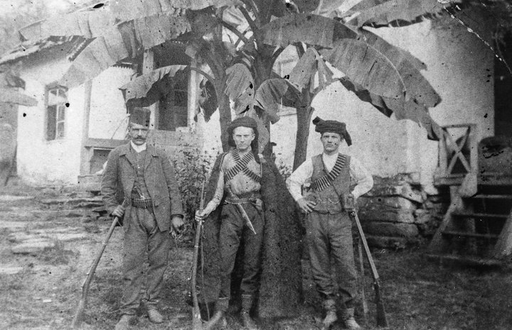 Sulevi küla jahimehed vana-vanaisa maja õuel banaanipuu varjus. (1920)